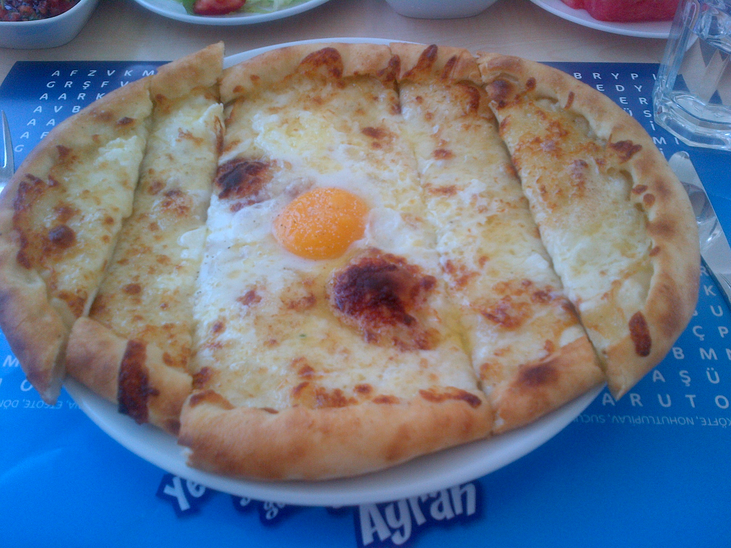 "Yağlı" es un "pide" de la Region del Mar Negro, que comprende de un huevo frito y mantequilla sobre el pide. Esta versión tiene también queso.